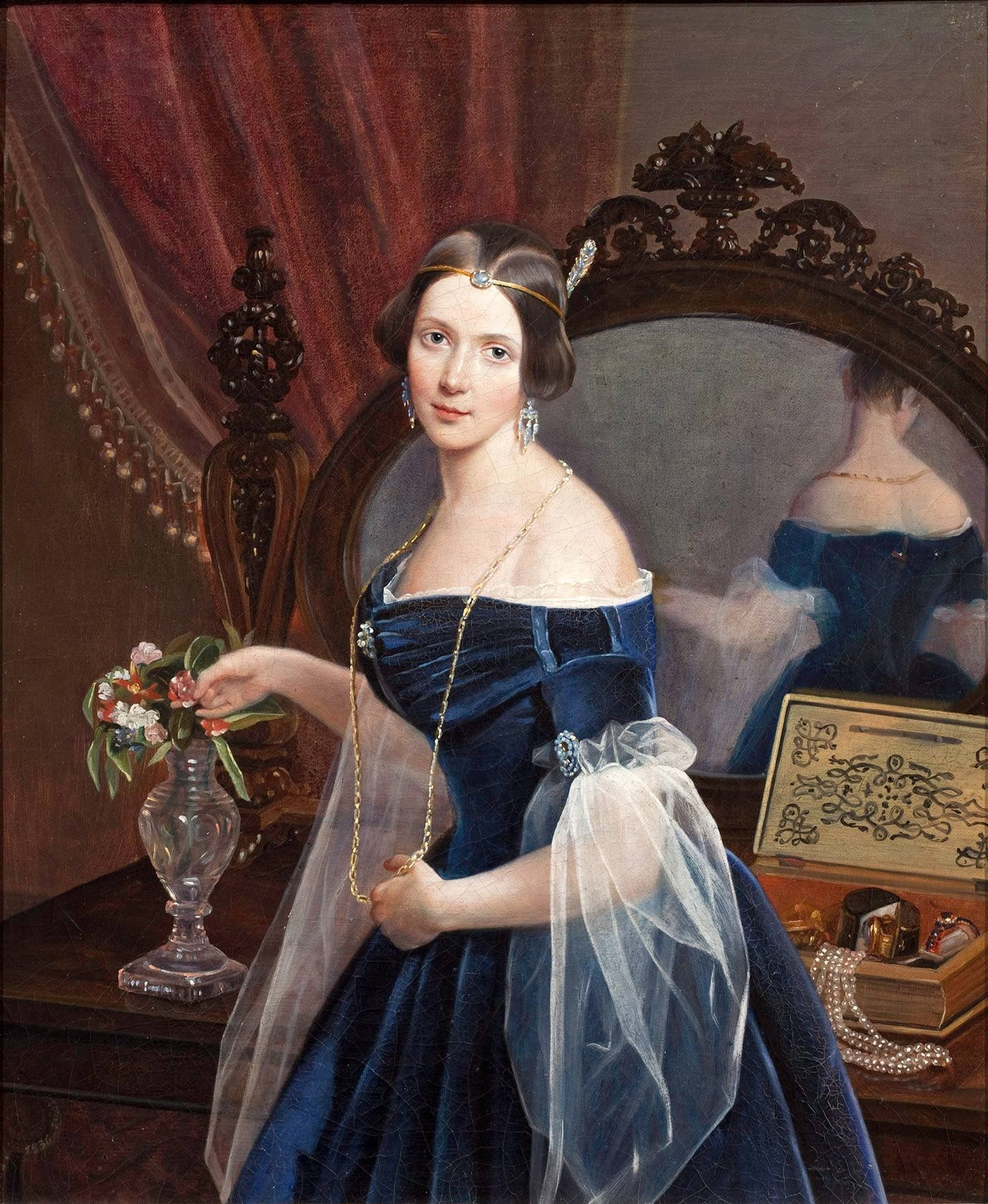 Н.П. Панина